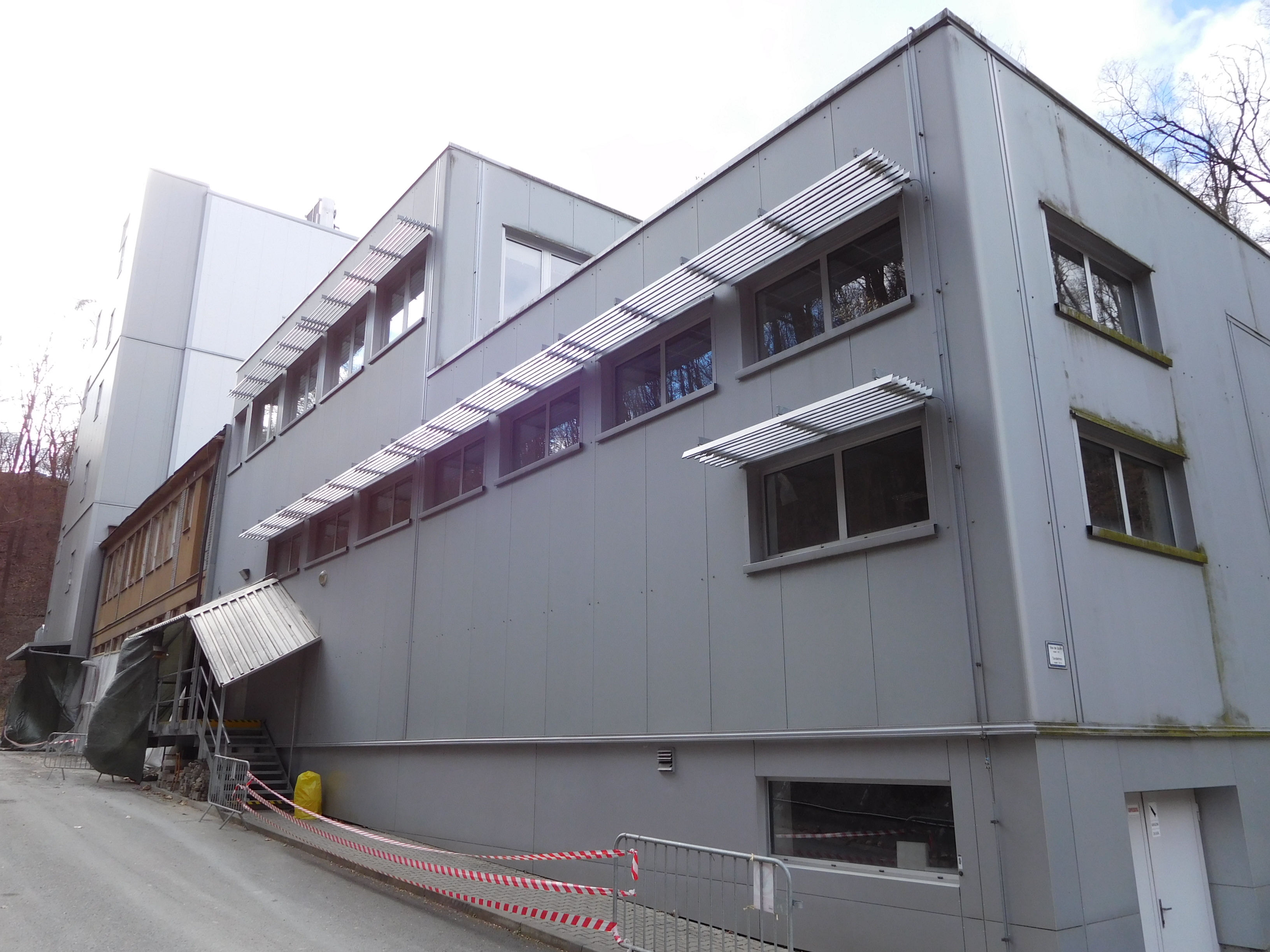 Řež, Ústav jaderné fyziky, budova tandetronu